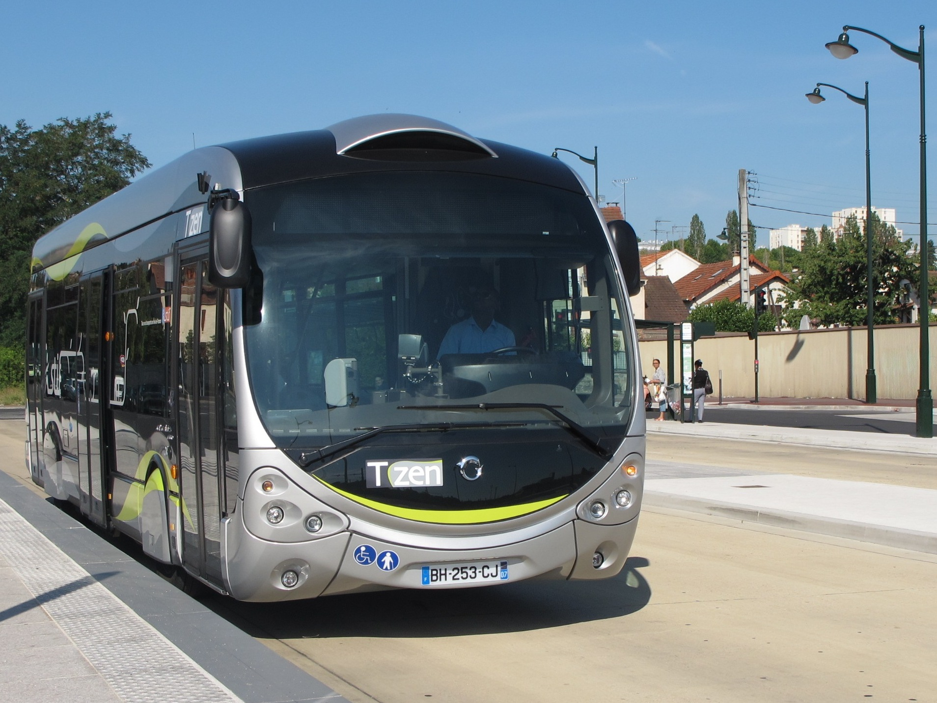 Bus T-ZEN ligne 1 - Gare de Lieusaint (Seine-et-Marne) - Gare de Corbeil-Essonnes (Essonne), France.